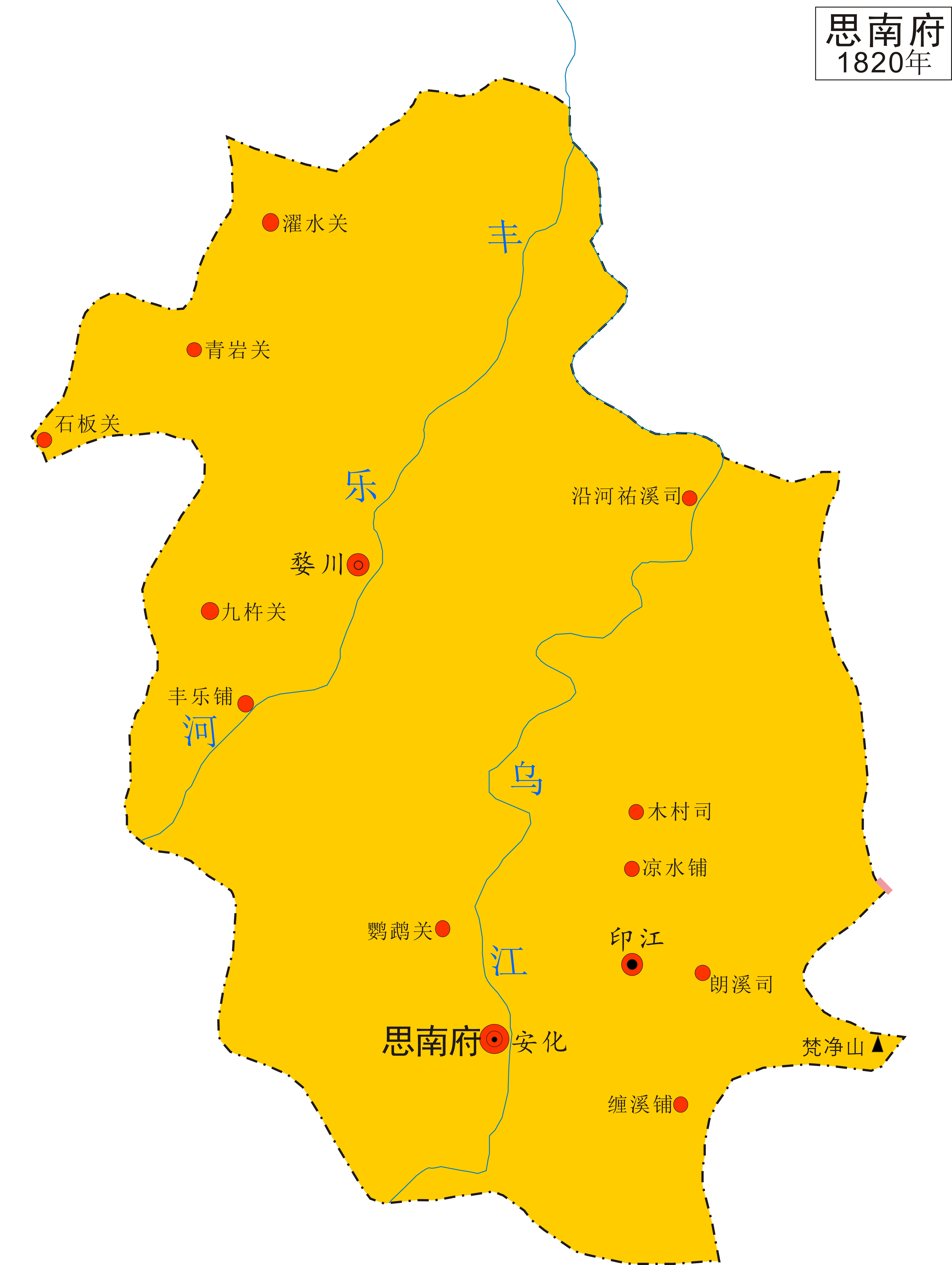 中文（中国大陆）: 这是清嘉庆二十五年（1820）的思南府地图